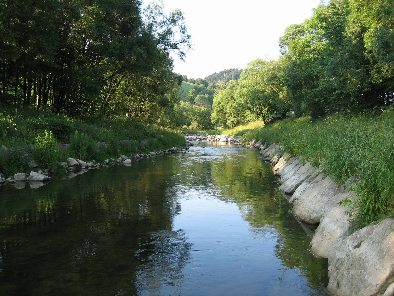 Vsetínská Bečva v Novém Hrozenkově dolní Čubov